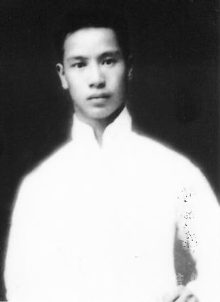 林继庸图片